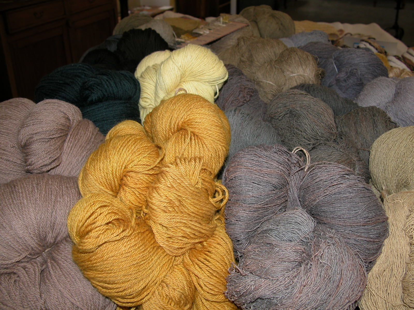 Foto mia personale, matasse di seta e lana tinte con colori vegetali Licensing Categoria:Immagini sulla tessitura